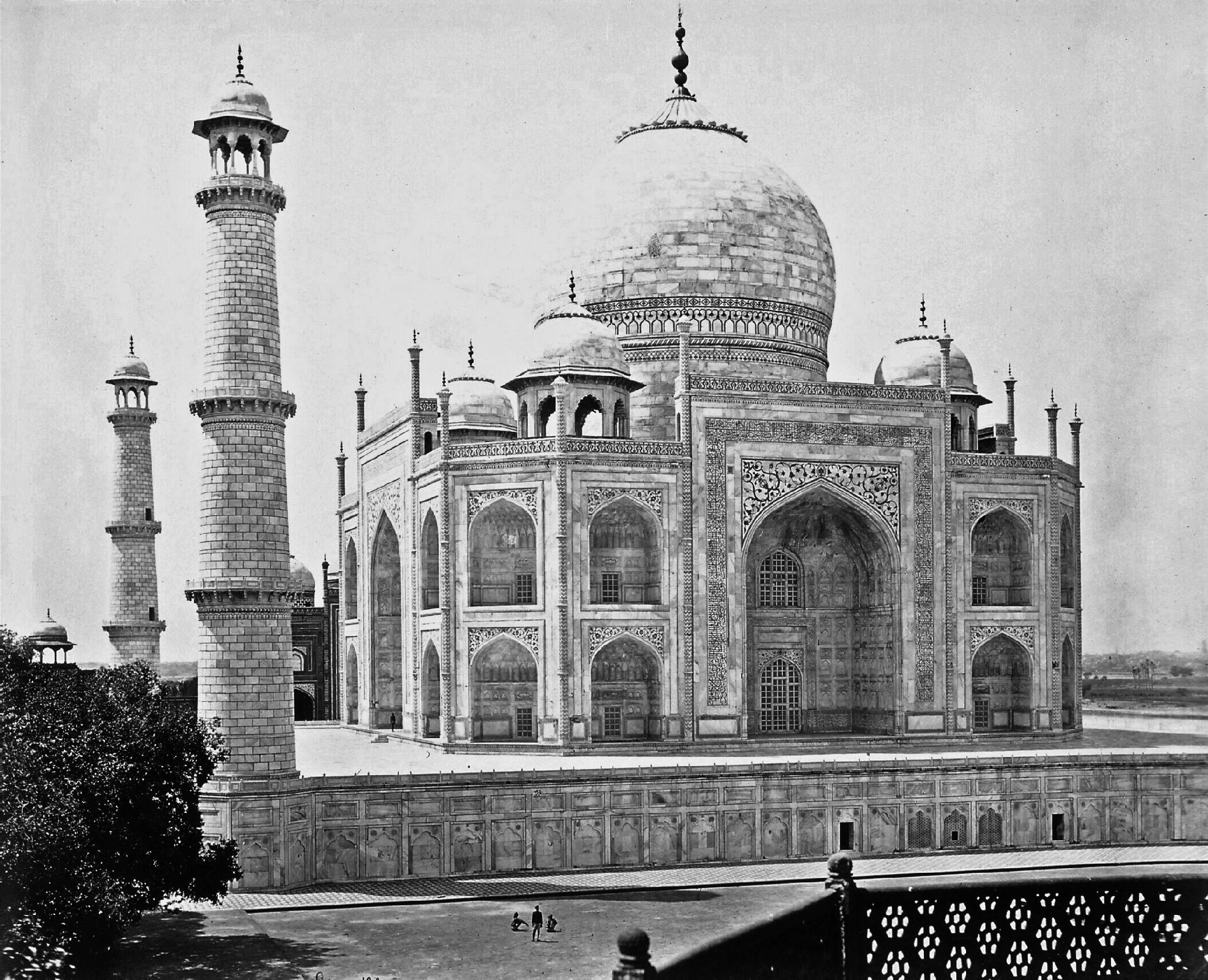 Taj Mahal, Agra, India